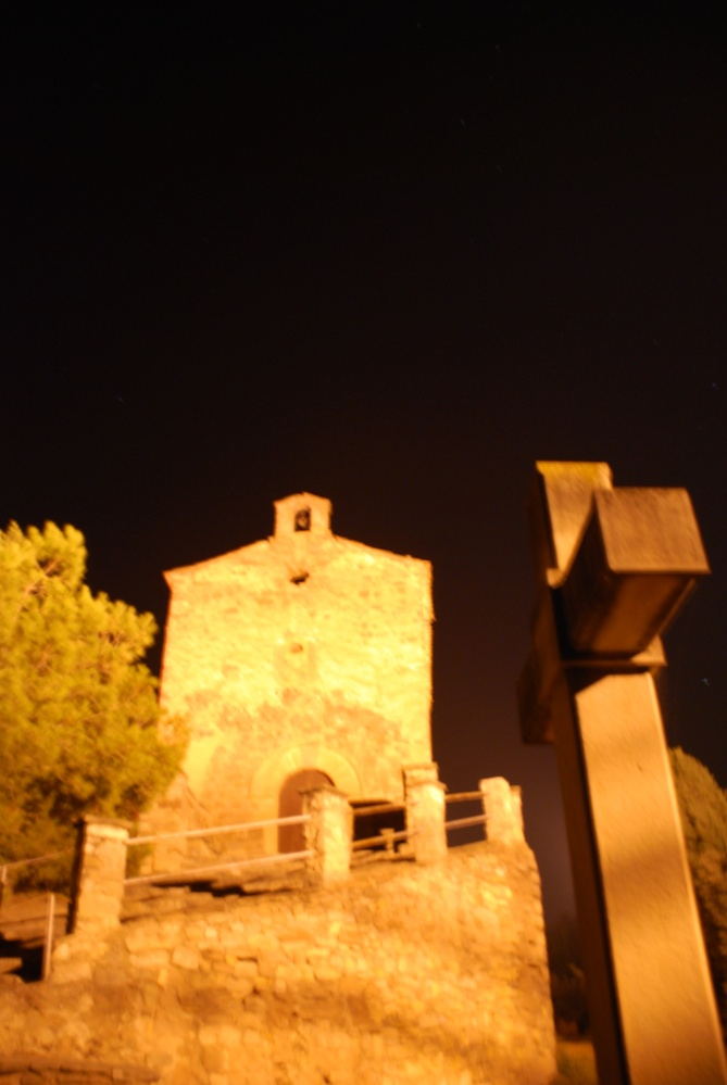 No tengo trípode y mi pulso es de anciano de 80+ con parkinson avanzado... ;)